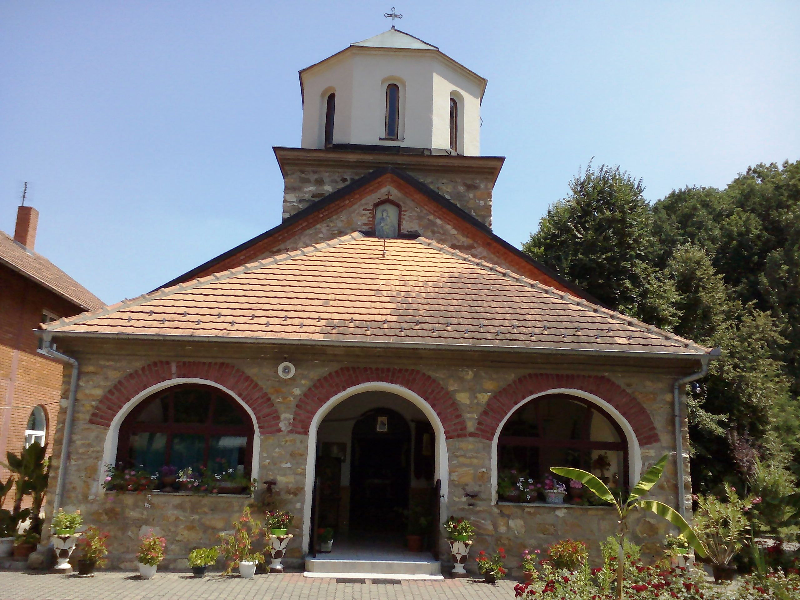 Фотографије манастира Радошин у истоименом селу код Свилајнца